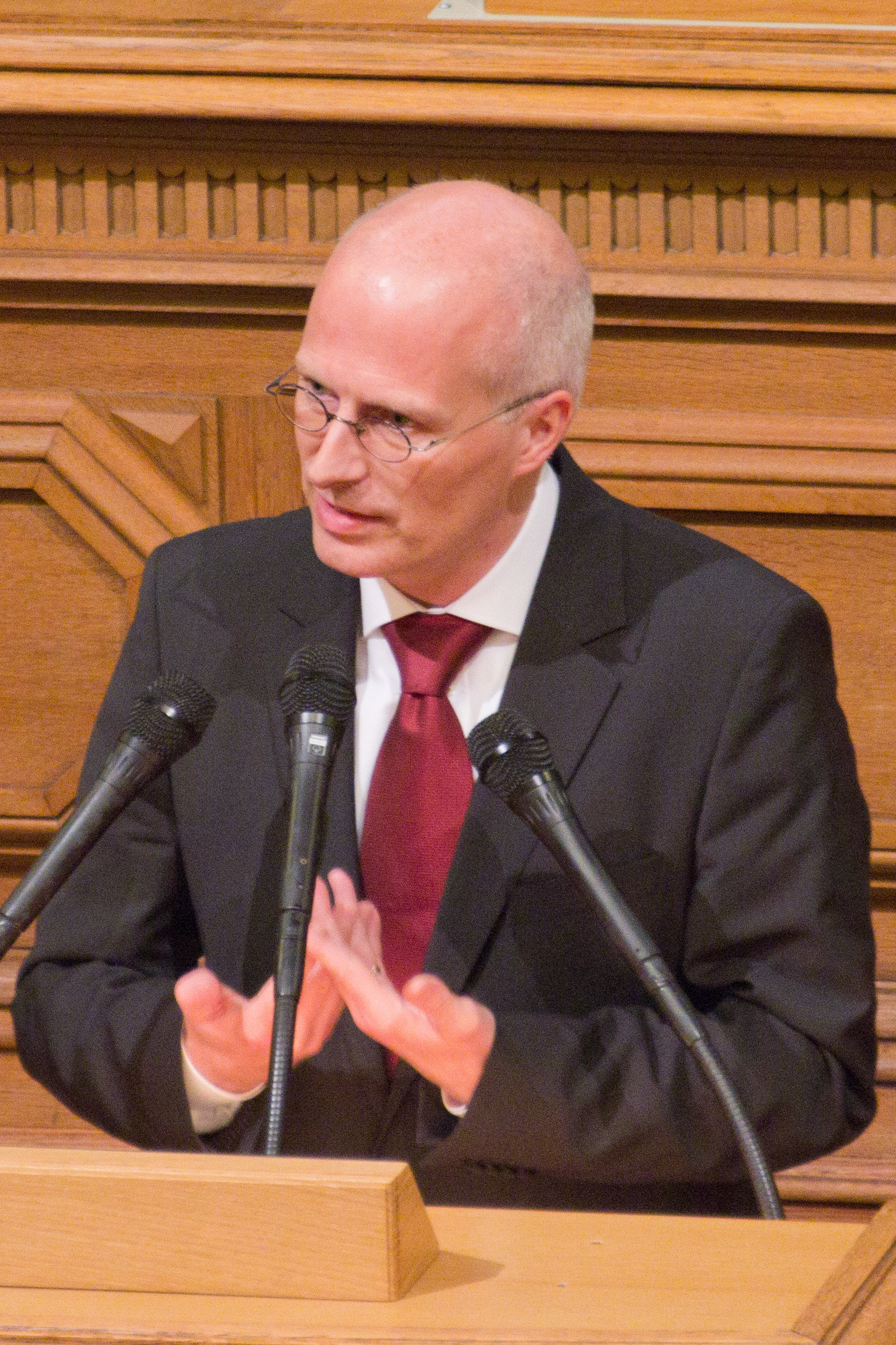 Peter Tschentscher, Mitglied der Hamburgischen Bürgerschaft, Finanzsenator der Freien und Hansestadt Hamburg, SPD